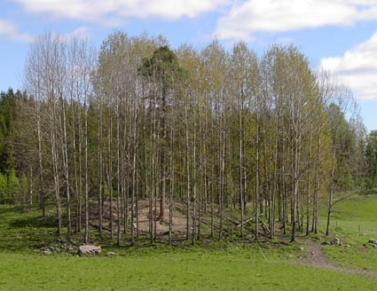 Populus tremula. Asp i olika lövsprickningsfas, dvs grupper ur olika rotskott Photo: Damast